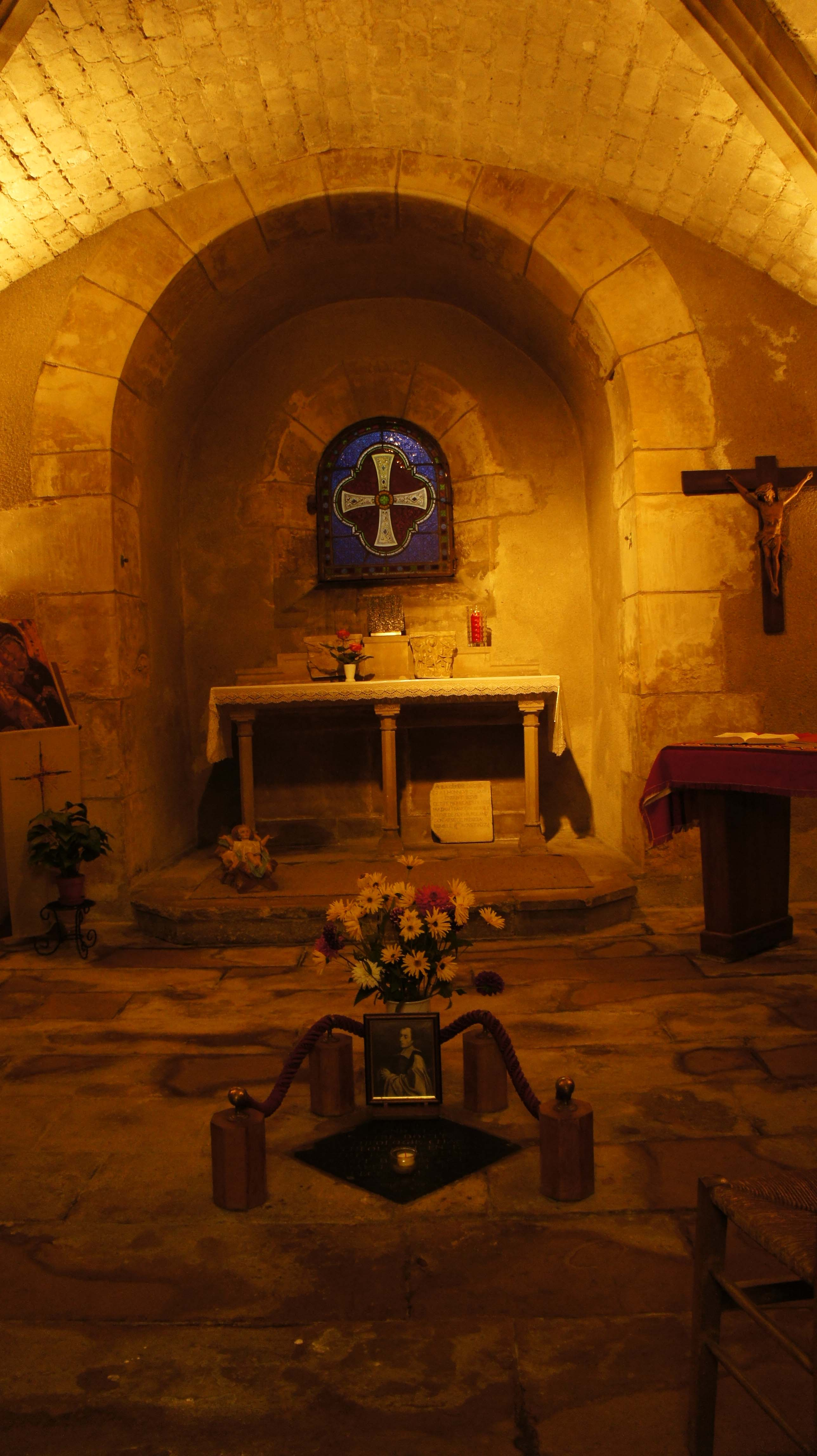 Crypte où repose Nicolas Roland, 48 rue du Barbâtre à Reims.